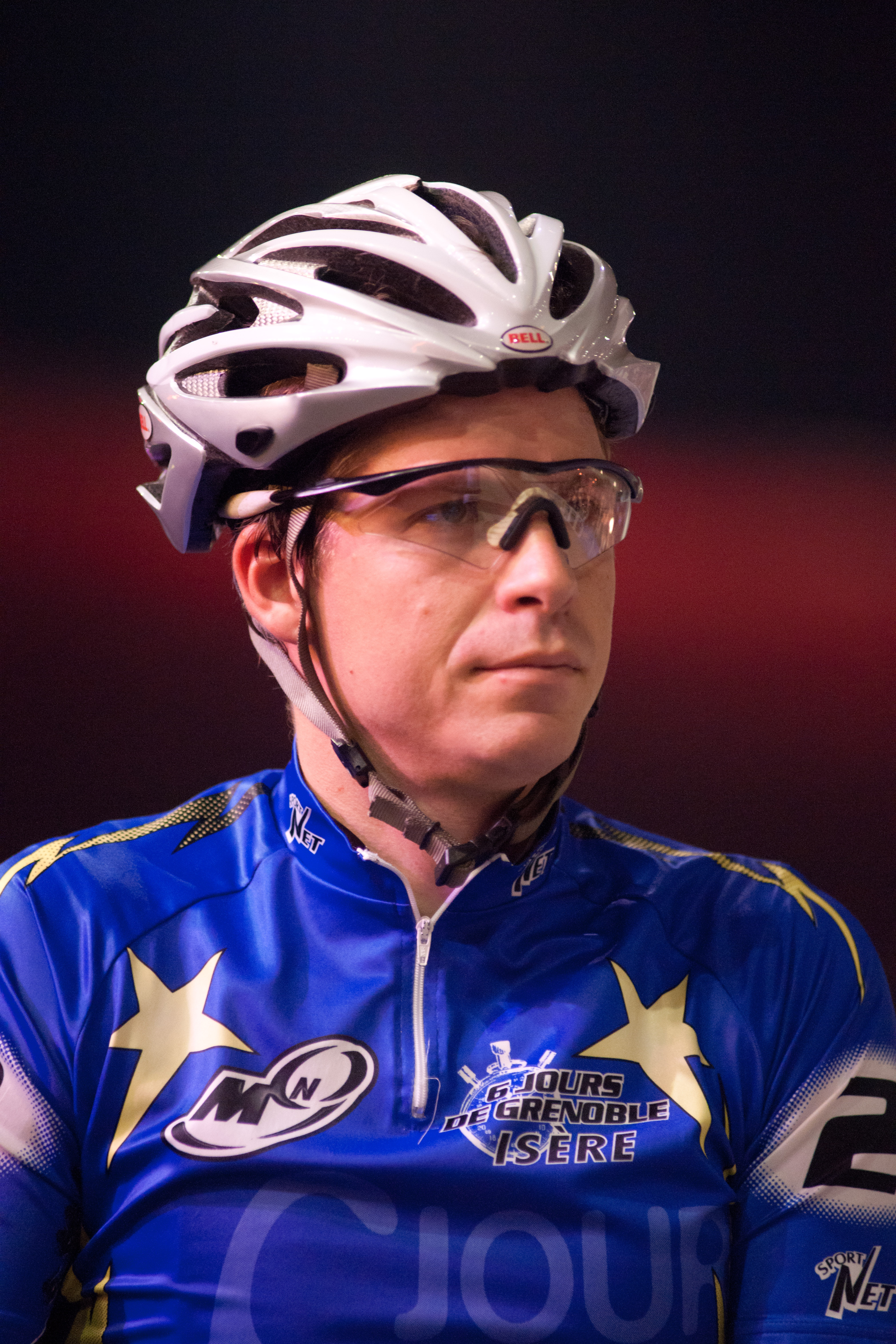 Martin Bláha au Six jours de Grenoble 2011